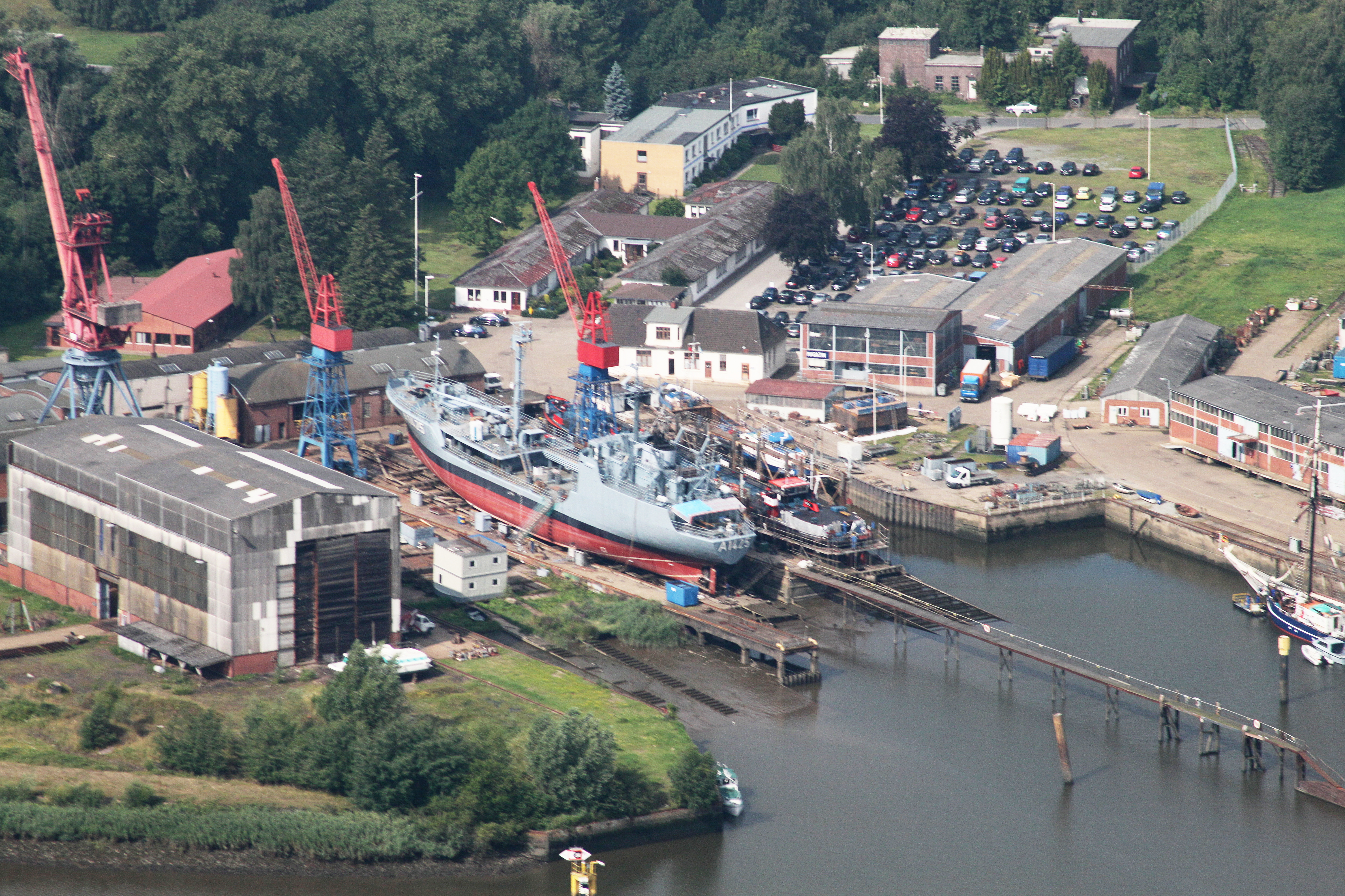 Fotoflug Bremen; Flughöhe 500 m; Elsflether Werft mit Salomon (IMO 5212581), Elsfleth